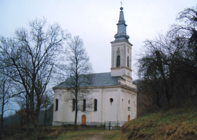 Црква у Новацима.